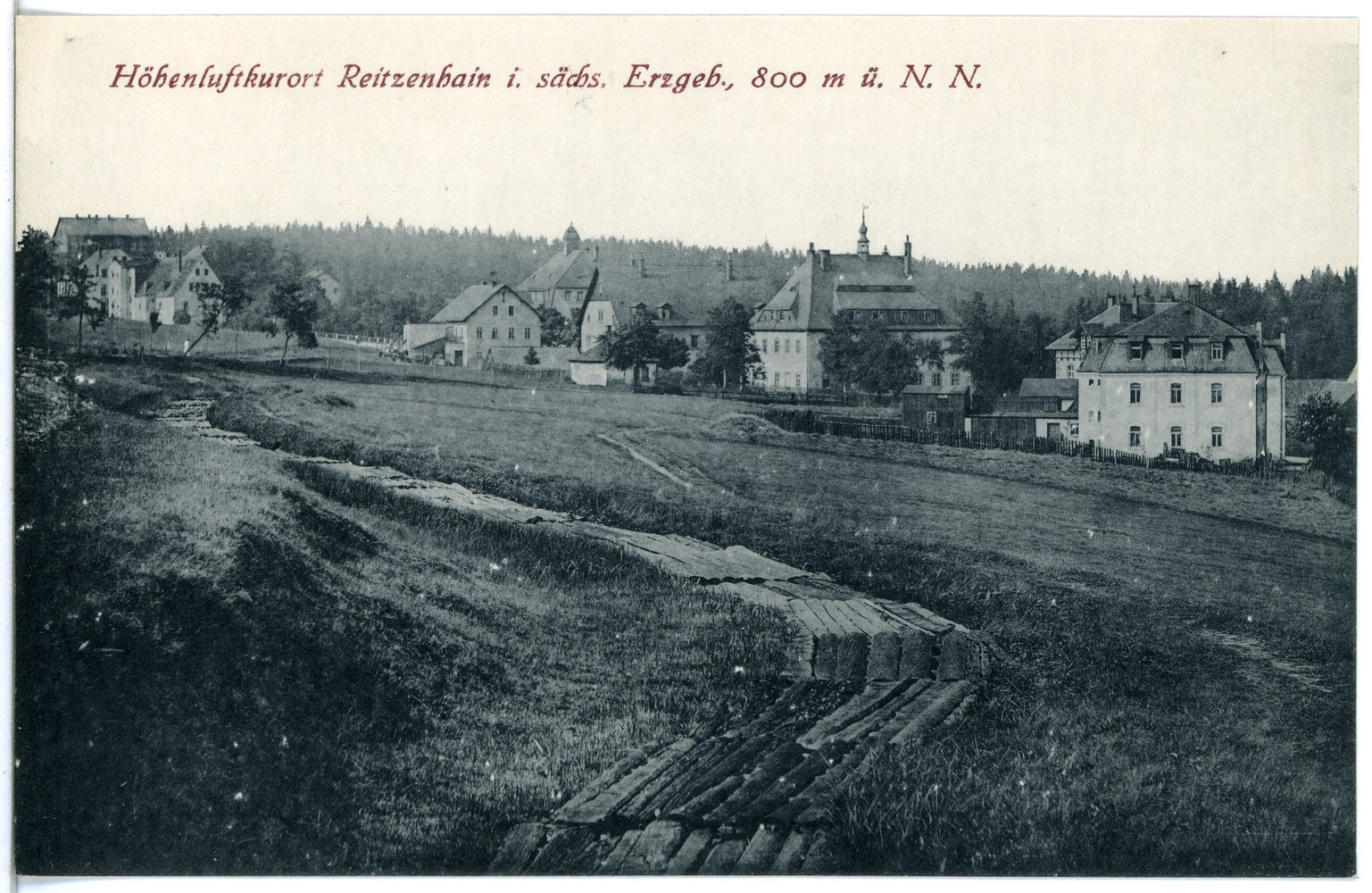 Reitzenhain; Blick auf Reitzenhain This postcard is from publisher Brück & Sohn in Meißen ( postcard has a unique number 21090 and is available in a higher resolution at the publisher. This images was uploaded in a cooperation project between Wikipedians and the publisher.